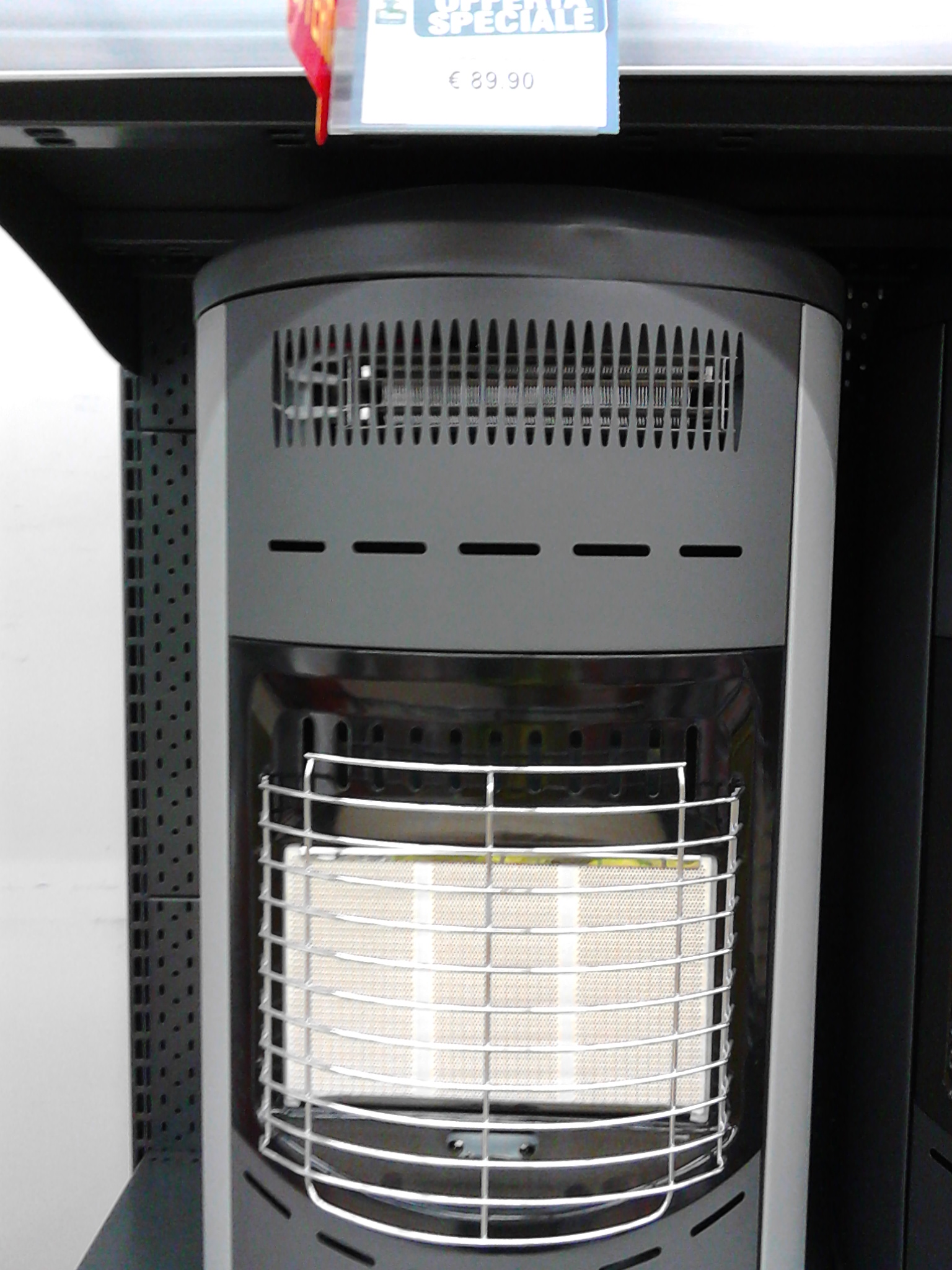 Stufa a gas con sistema di ventilazione forzata e resistenza elettrica